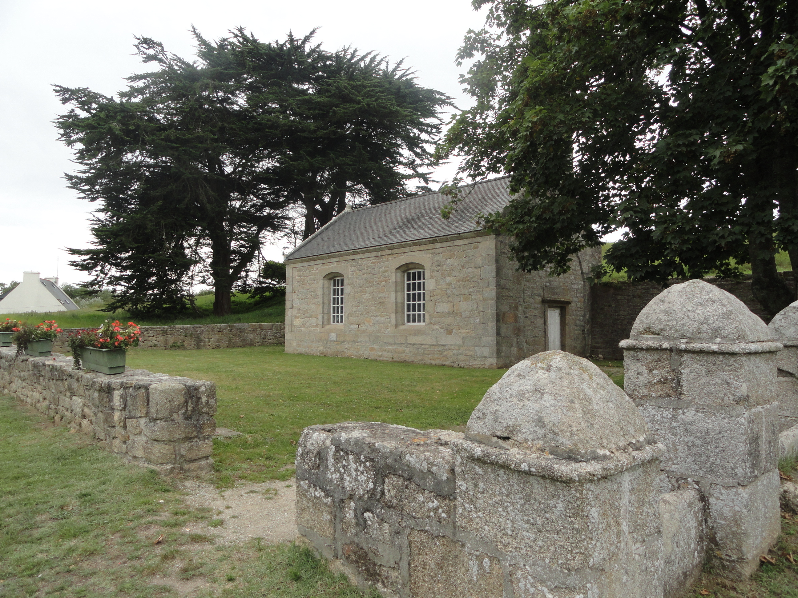 Chapelle de Saint-Egarec à Lampaul Plouarzel